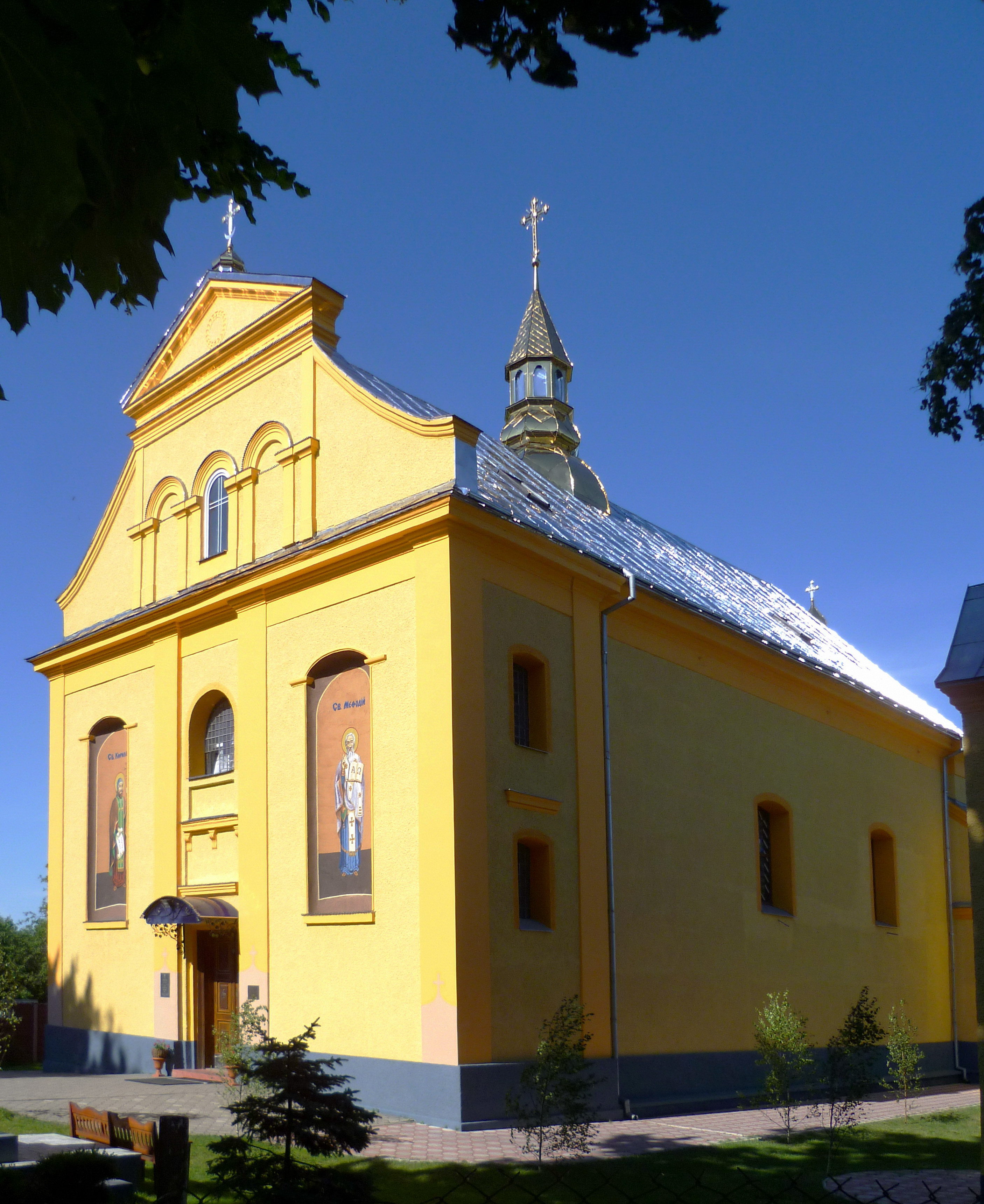 Церква св.Юрія (1846 р.) - вигляд з боку - в м.Рава-Руська (вул. Чкалова) Жовківського району Львівської області України